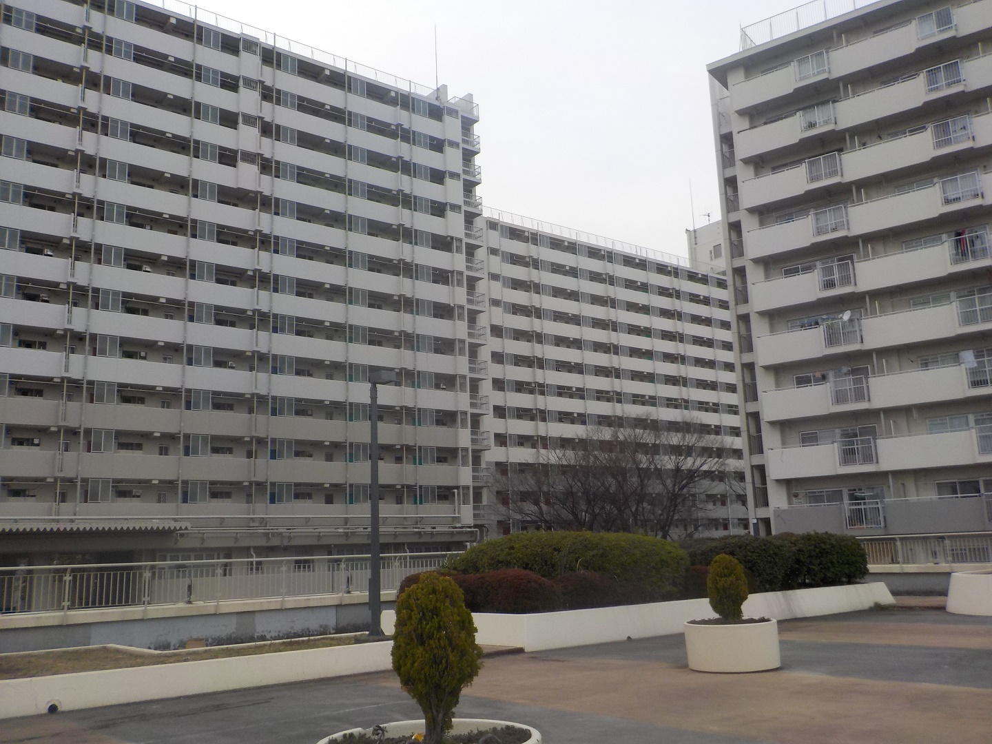 2019年3月、東京都足立区大谷田一丁目にある「大谷田一丁目団地」(俗称:大谷田団地)の、バス停近くの棟を店舗の上の広場から撮影したものです。